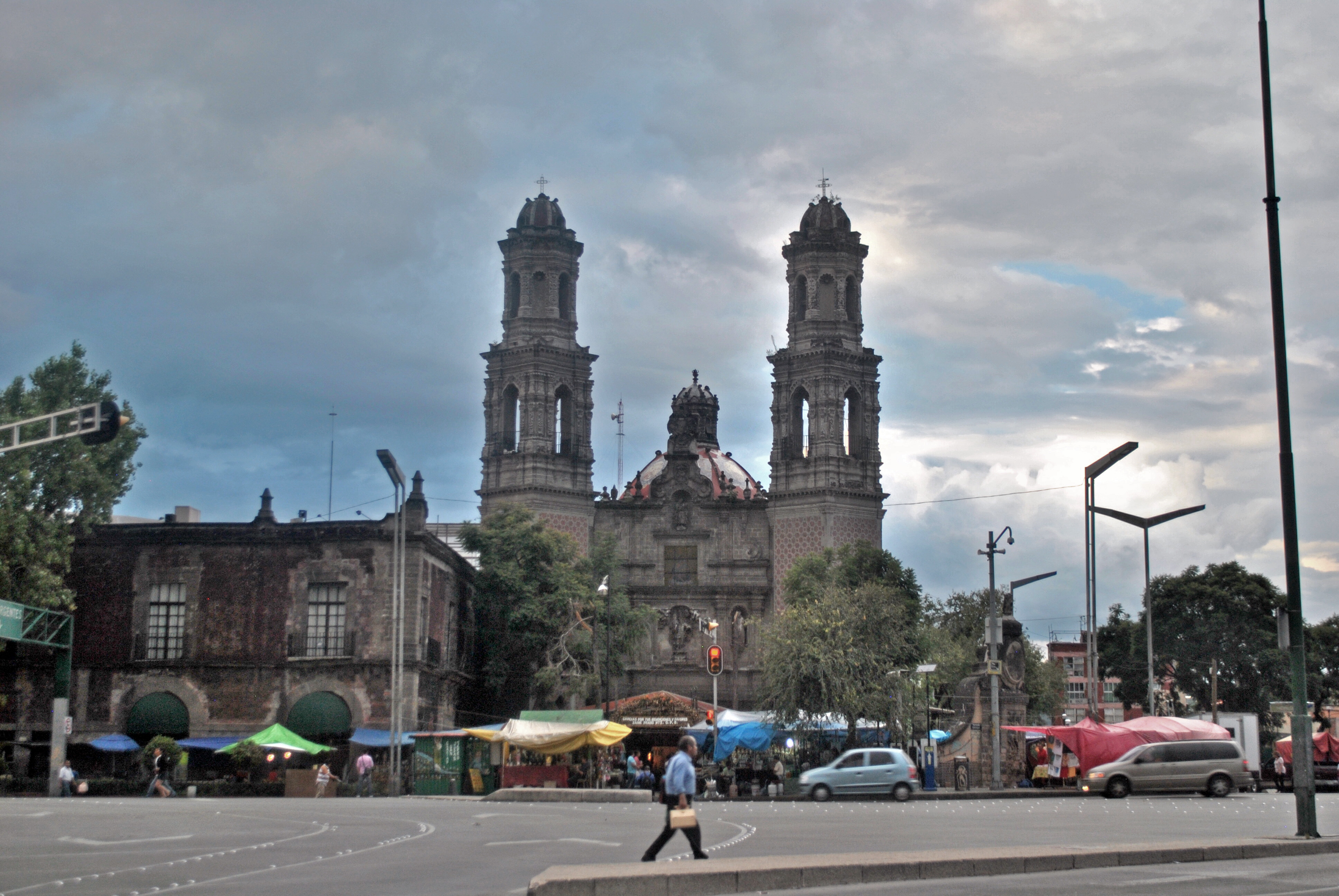 Templo de San Hipólito, Ciudad de México, también dedicado a San Judas Tadeo.